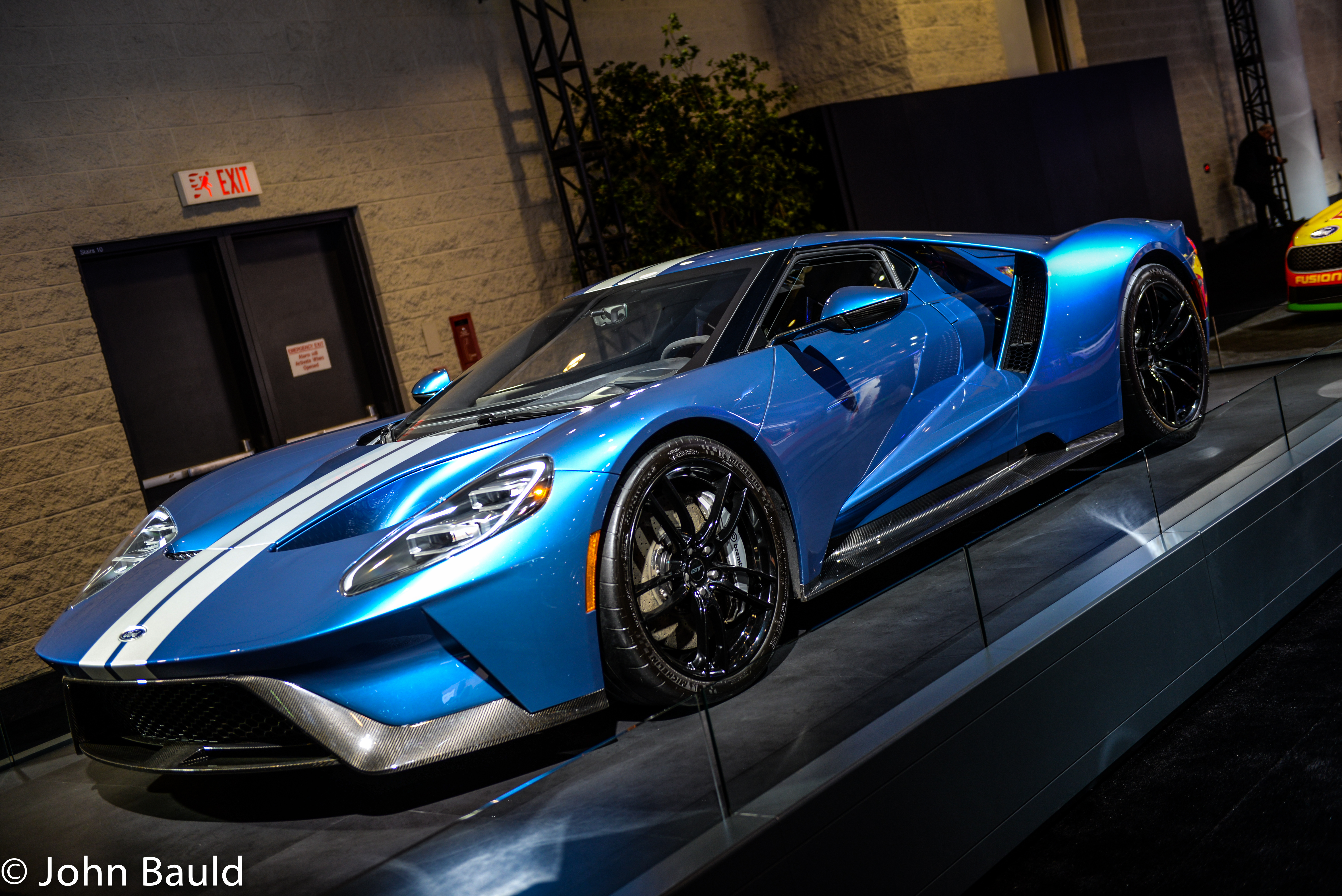 Ford GT